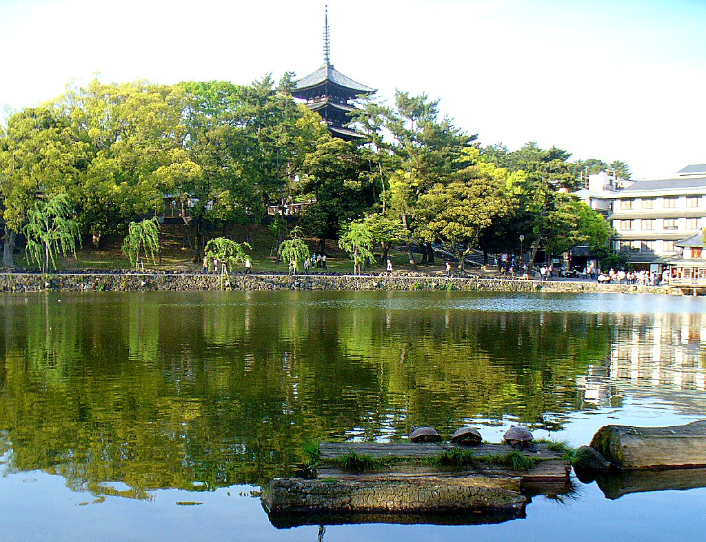 奈良県奈良市の奈良公園にある猿沢池（昼）